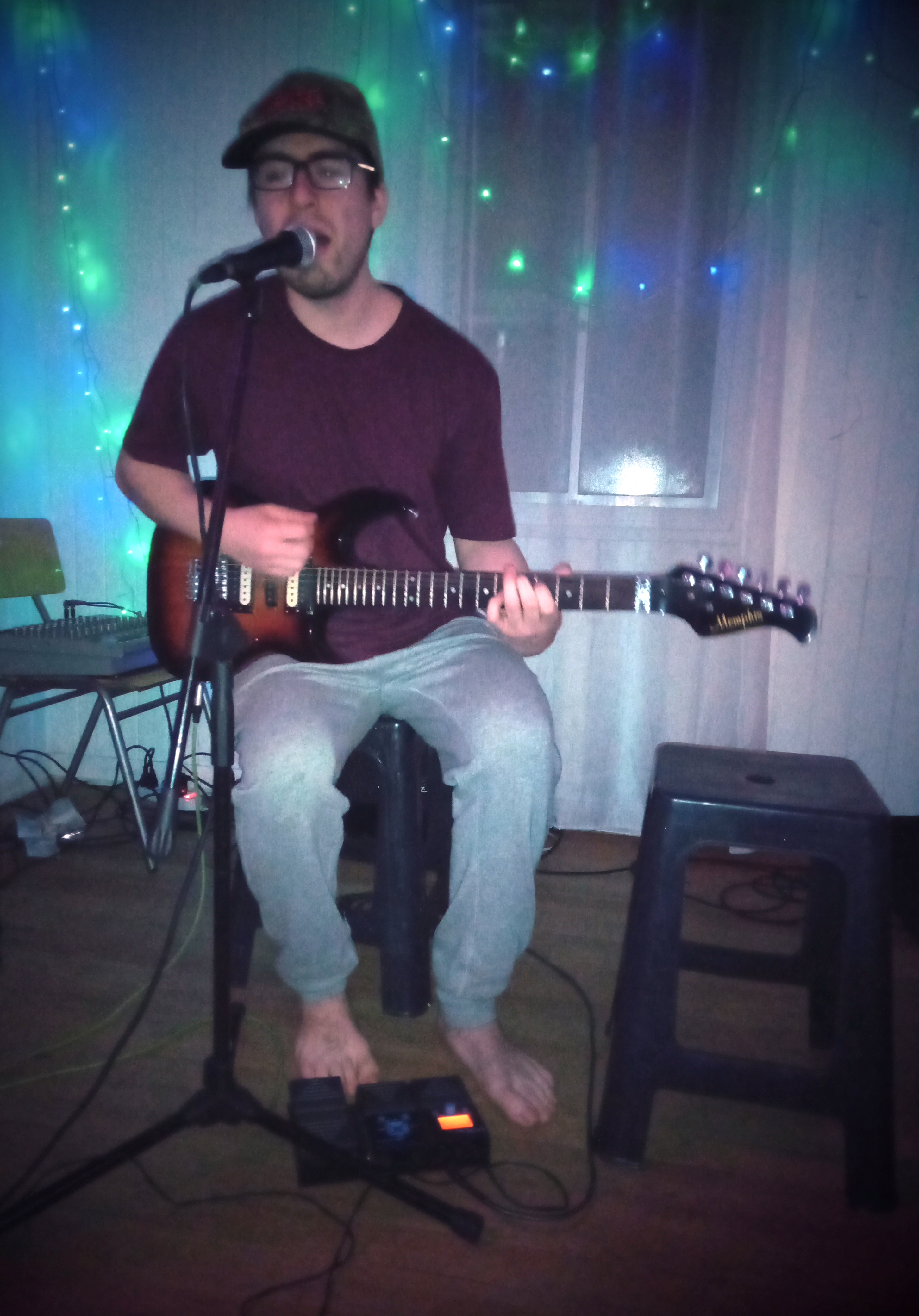 Chicoplaya, cantante chileno, en las Sesiones Invernales, evento realizado en Érase Un Taller, ubicado en la población Llaima, sector Poniente de la ciudad de Temuco, Chile.